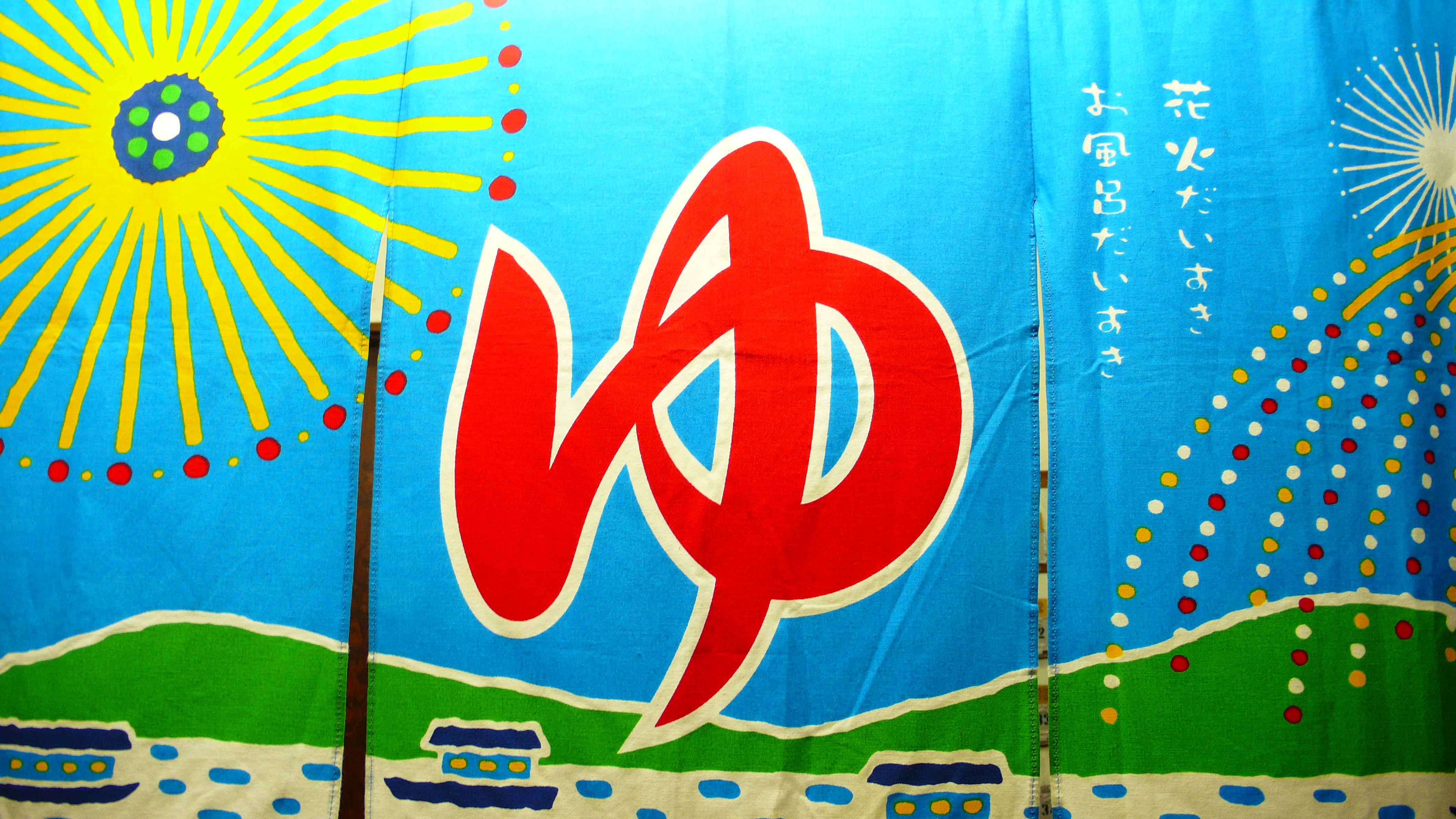 銭湯の暖簾（東京都江東区森下、森下駅最寄り）